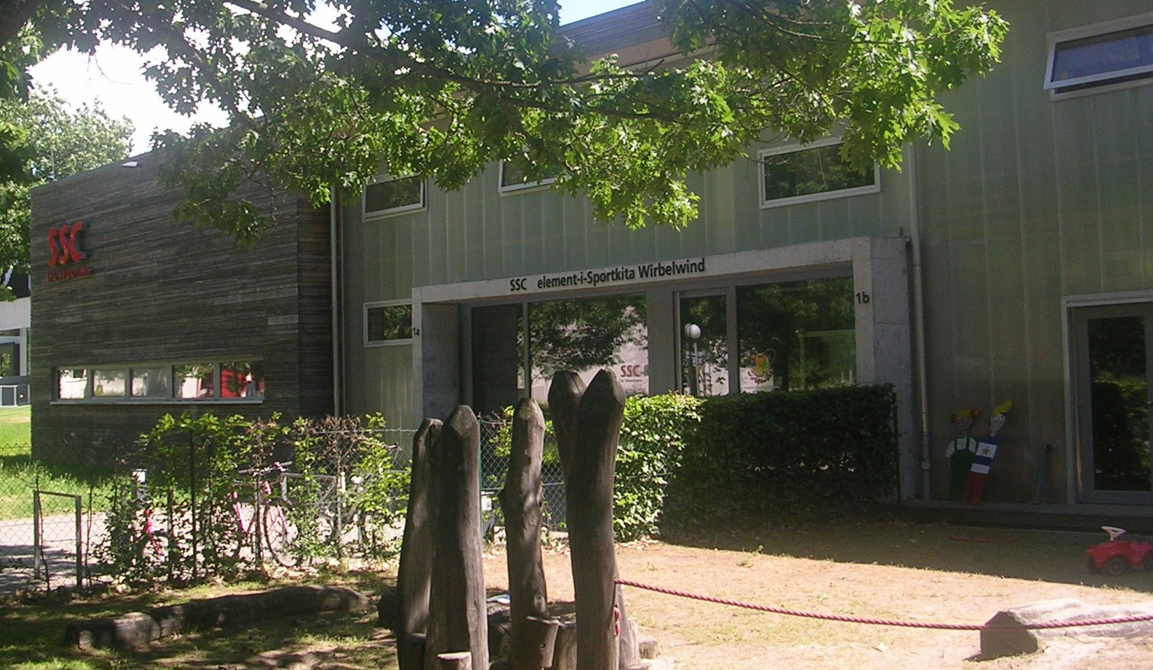 Die Sportkita Wirbelwind des SSC Karlsruhe wurde als Sport- und Bewegungskindergarten am 22. März 2012 eröffnet.